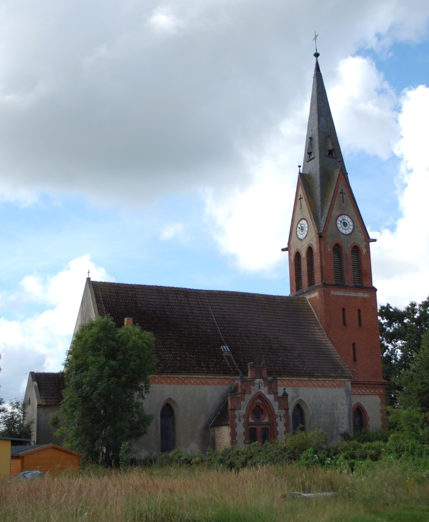 Dorfkirche Hammelspring